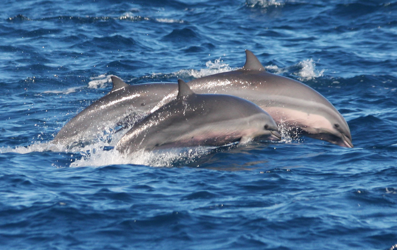 雌性弗氏海豚